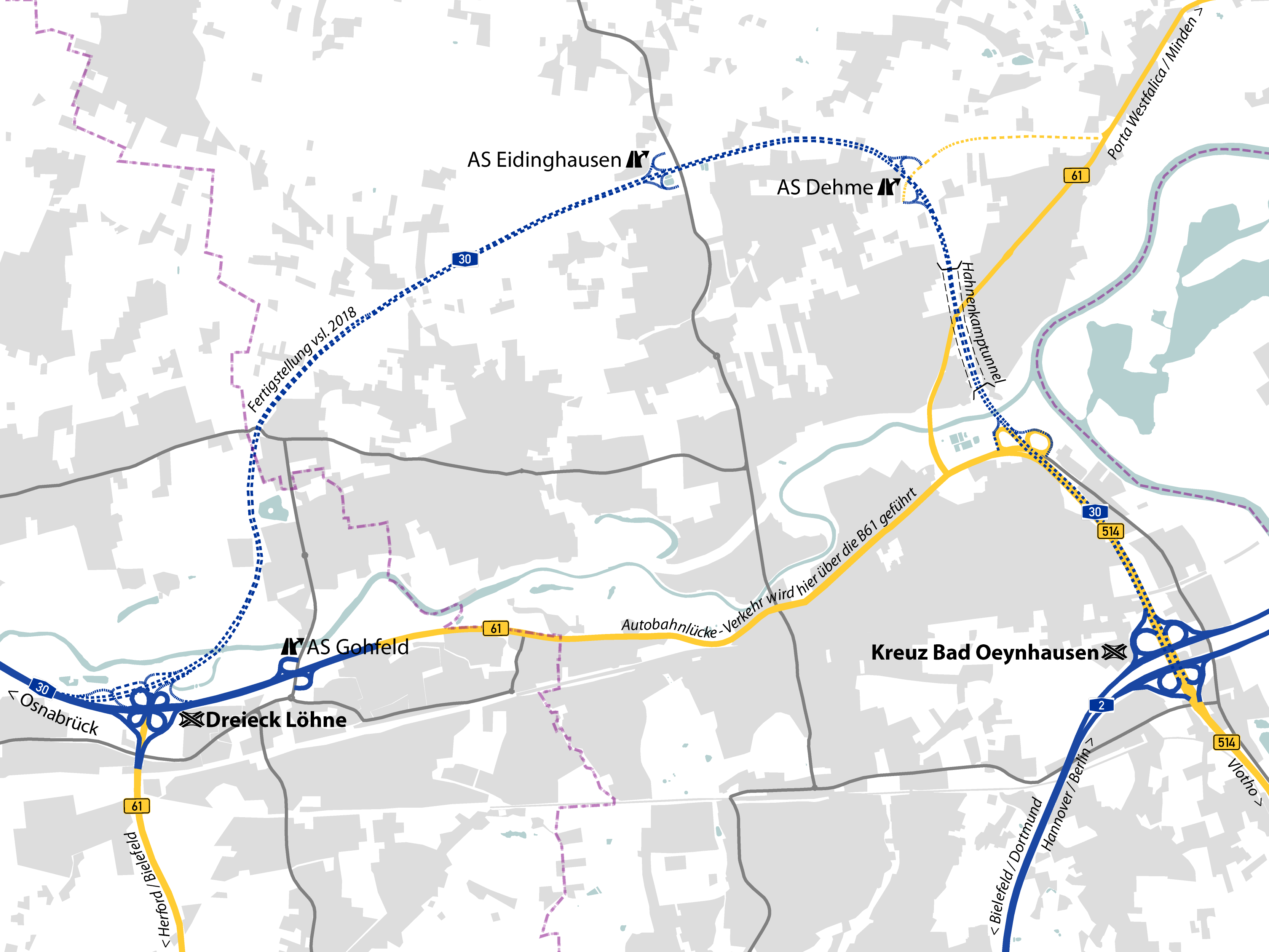 Lageplan Nordumgehung Bad Oeynhausen